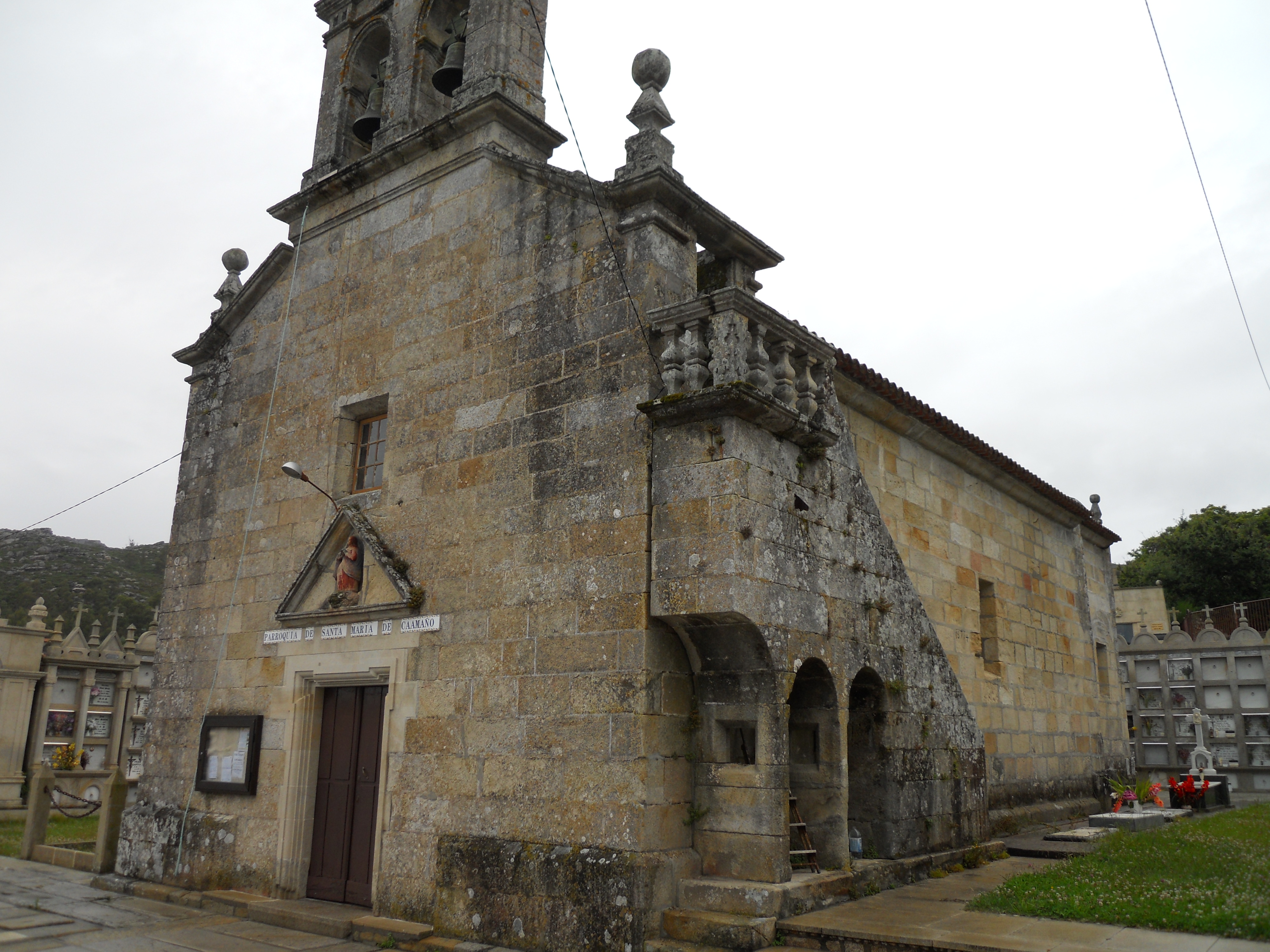 La construcción original romanica del siglo XII fue remodelada en el siglo XVIII, conservando gran parte de su cabecera.